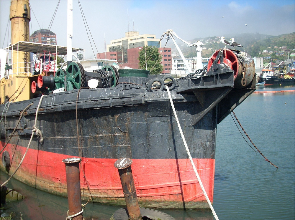 Remolcador RAM Poderoso